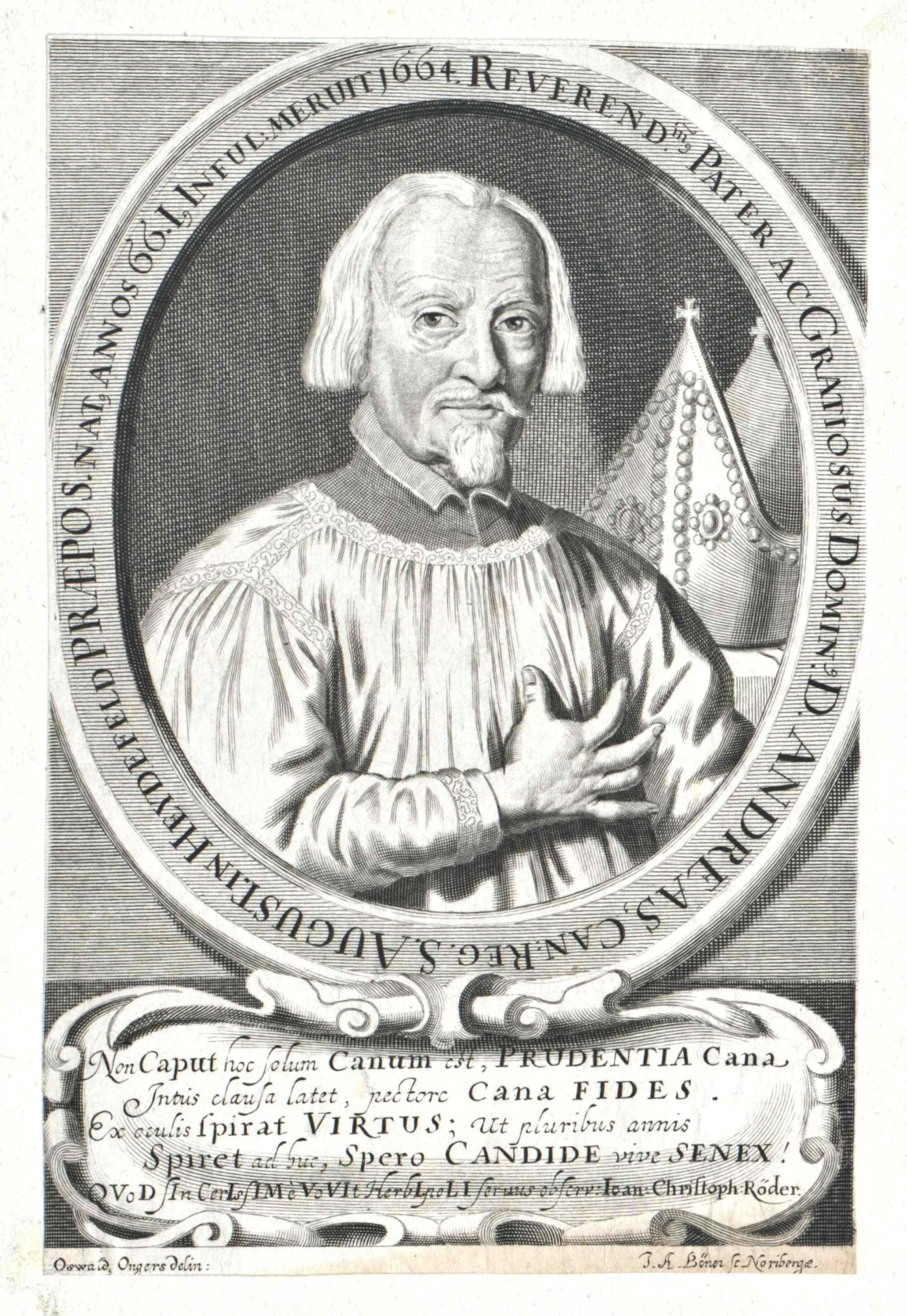 Andreas Deichmann (1598-1673), infulierter Propst von Kloster Heidenfeld, Franken